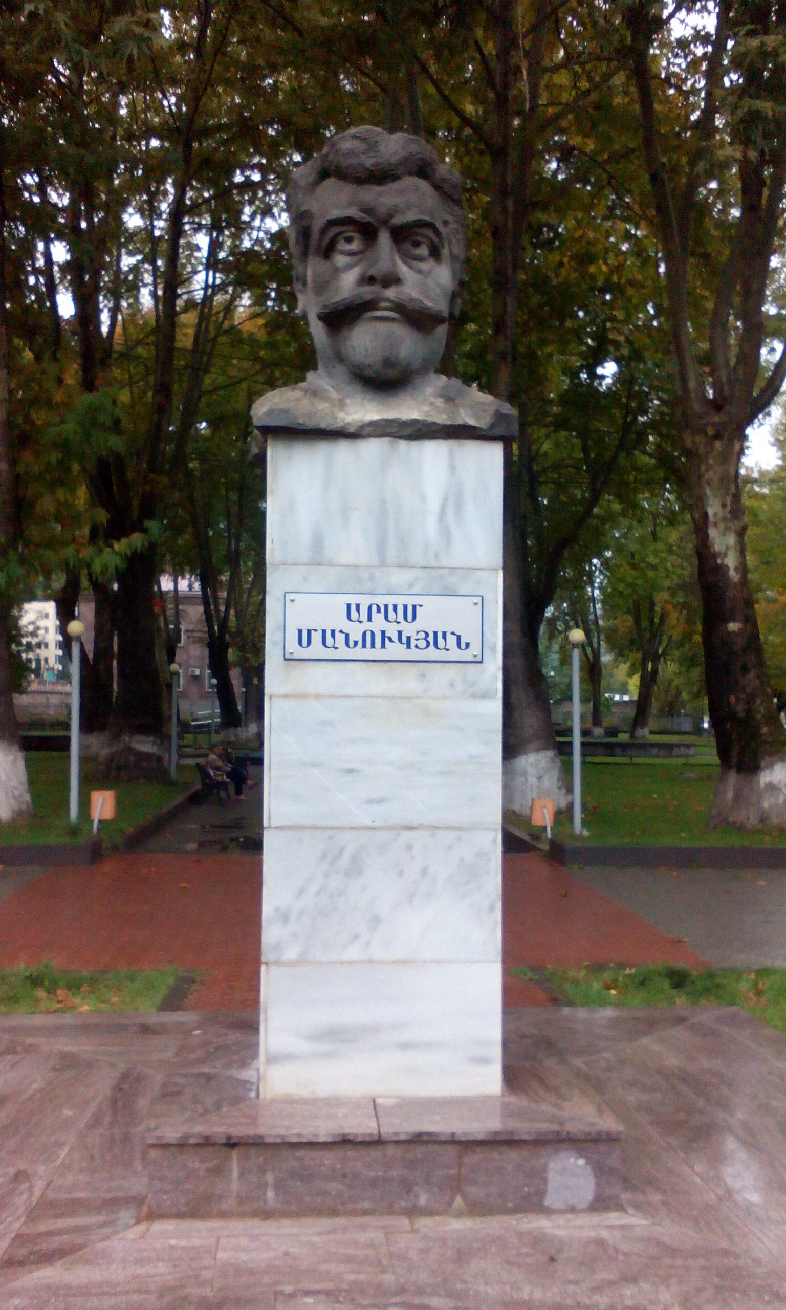 Արամ Մանուկյանի անվան հուշարձան Կապանում